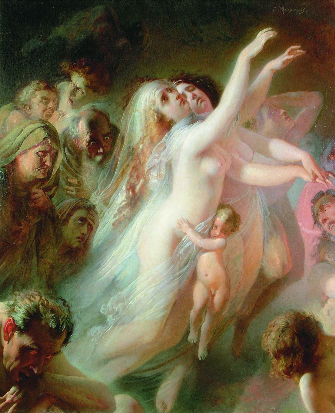 «Харон перевозит души умерших через реку Стикс»Charon carries dead souls across the River Styxtitle QS:P1476,ru:"Харон перевозит души умерших через реку Стикс" label QS:Lru,"Харон перевозит души умерших через реку Стикс" label QS:Lde,"Charon transportiert die Seelen der Toten über den Fluss Styx" label QS:Len,"Charon carries dead souls across the River Styx"